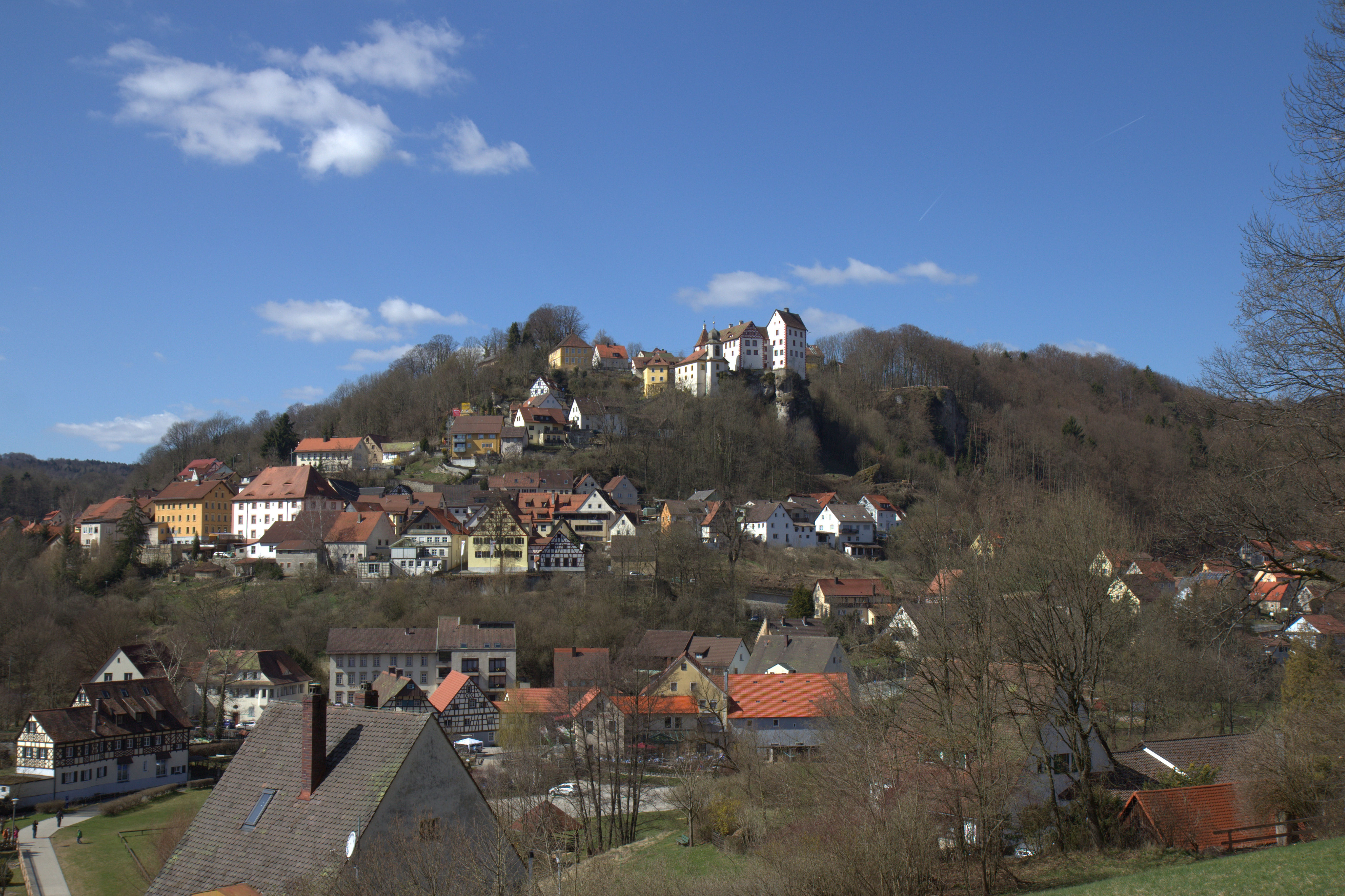 Burg Egloffstein - Ansicht aus östlicher Richtung